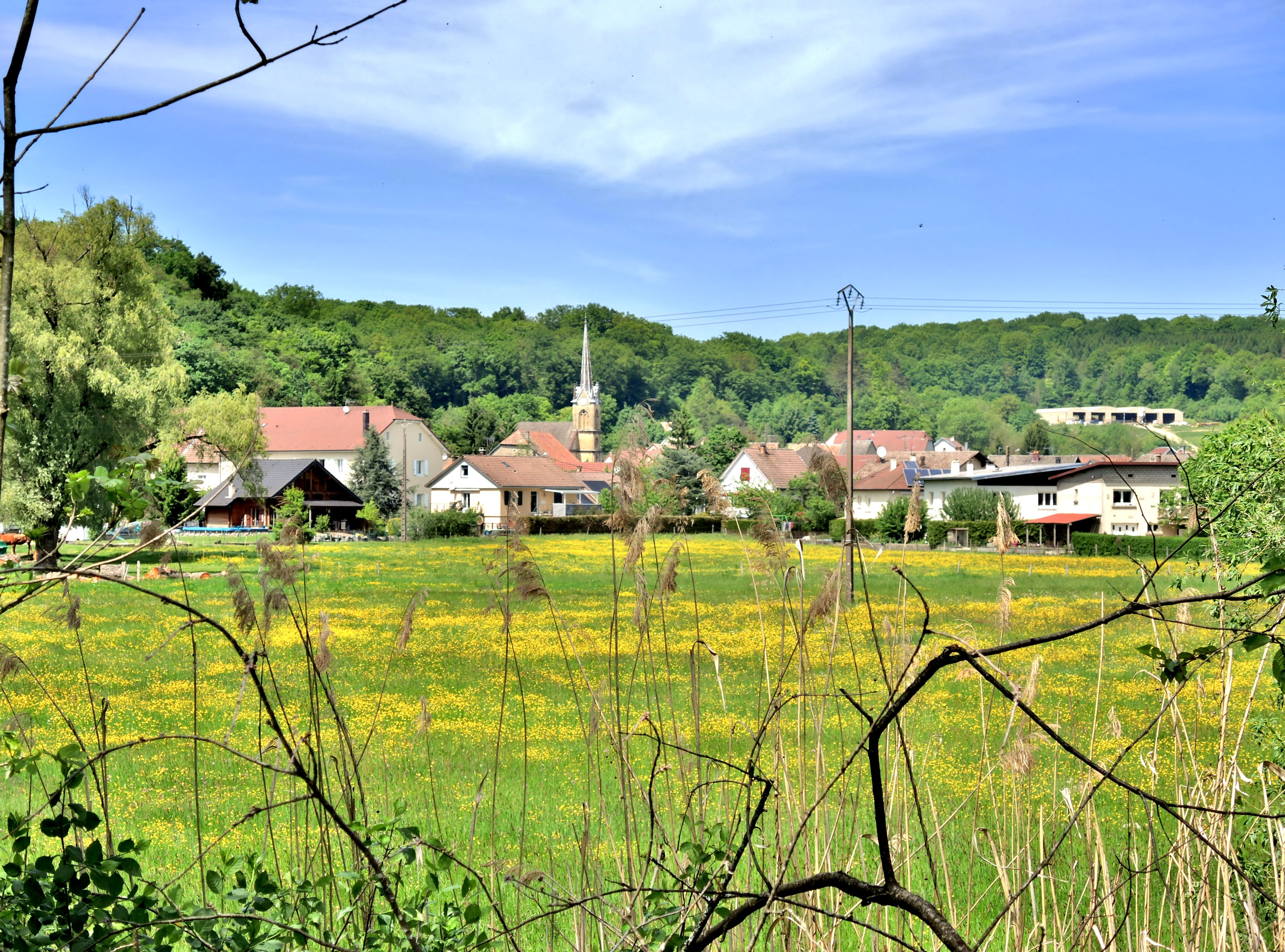 Allenjoie vu de la piste cyclable le long du canal. Doubs